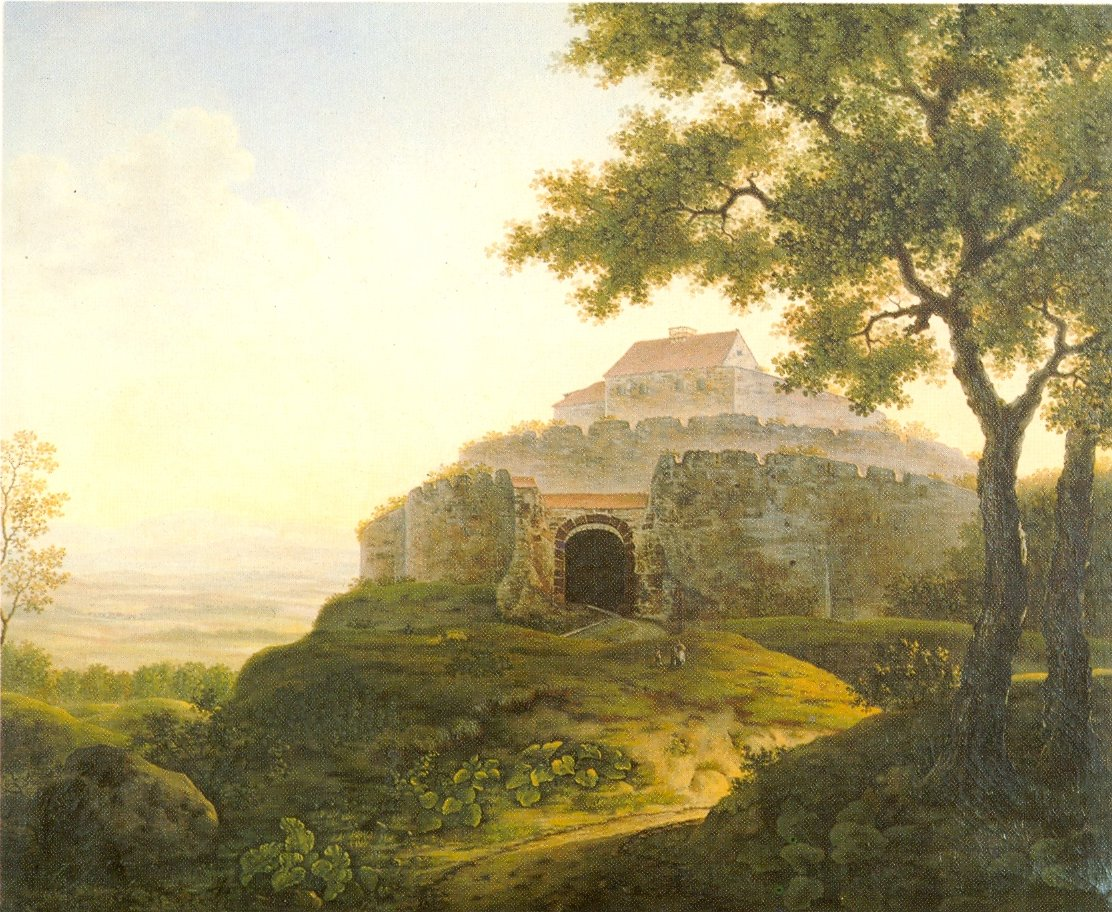 Schloss Württemberg auf dem Rotenberg